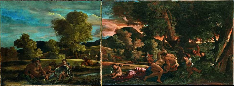 Coupé en 2 au XVIIIe siècle et réuni en 2010